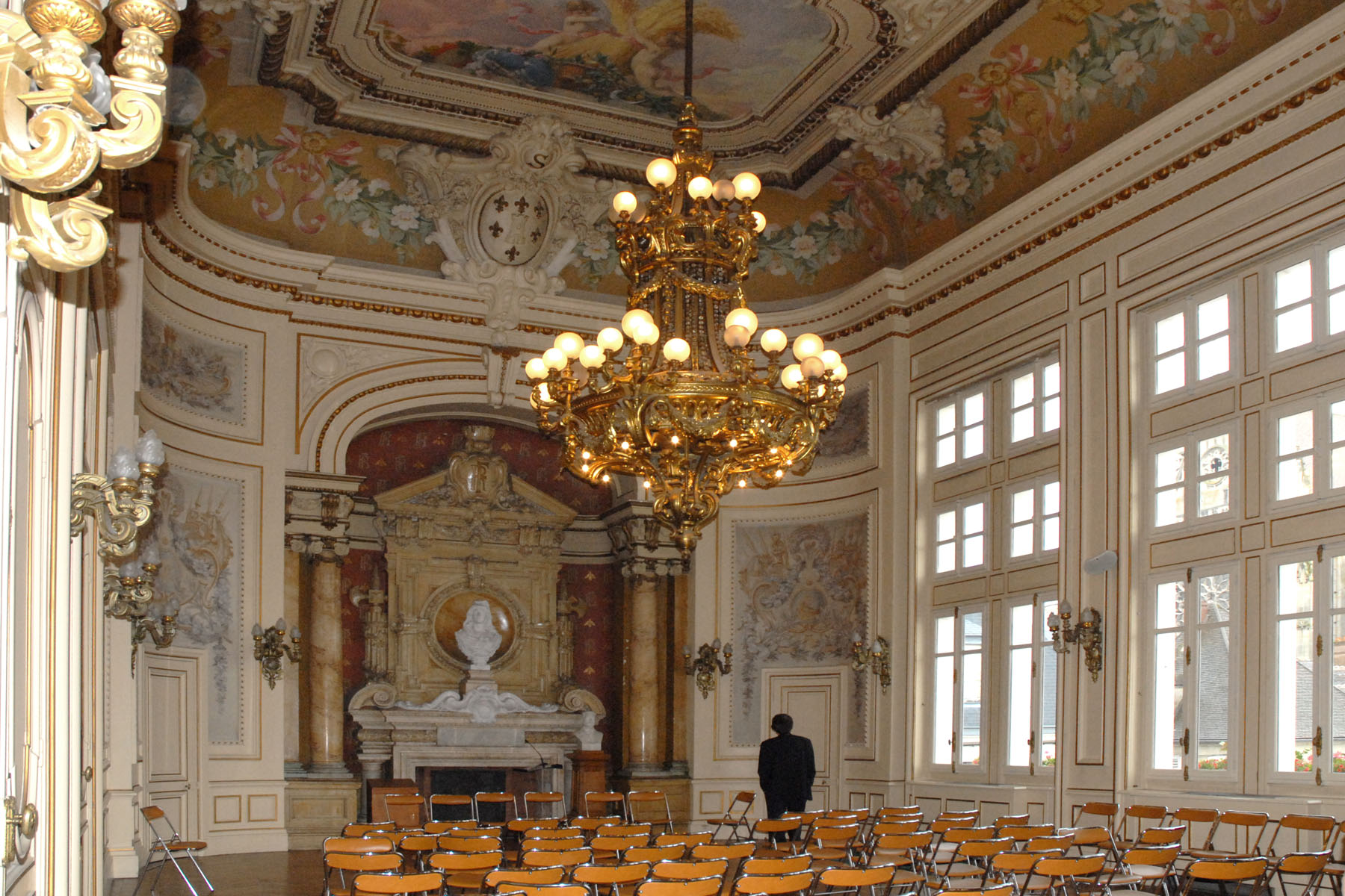 L'Hôtel de ville de Sens a été inauguré en 1904.